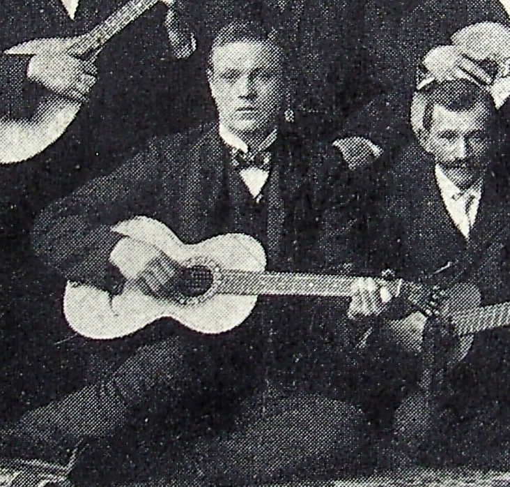 Dieser Ausschnitt aus einer Postkarte von 1904 ist der bisher einzige Beleg, dass C. H. Böhm tatsächlich auch Gitarren hergestellt hat.